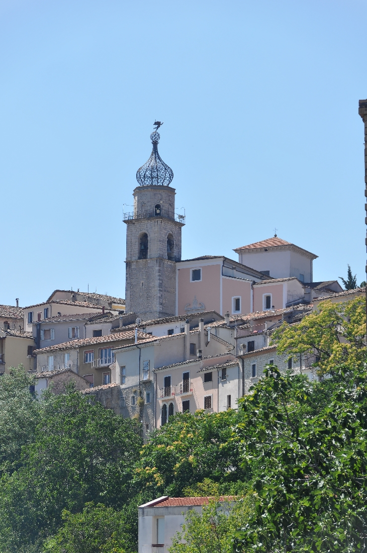 Sepino 2012 Dieses Foto entstand in Zusammenarbeit mit Stadtbesichtigungen.de Die Seiten Stadtbesichtigungen.de, der dazugehörige Reise Blog sowie die Facebookseite: Stadtbesichtigungen Rom dürfen dieses Bild für Ihre Veröffentlichungen ohne den Hinweis auf Wikipedia, Commons bzw der Lizenz verwenden. Die Verantwortlichen habe von mir (Ra Boe) die Originaldaten zur freien Verfügung übermittelt bekommen.